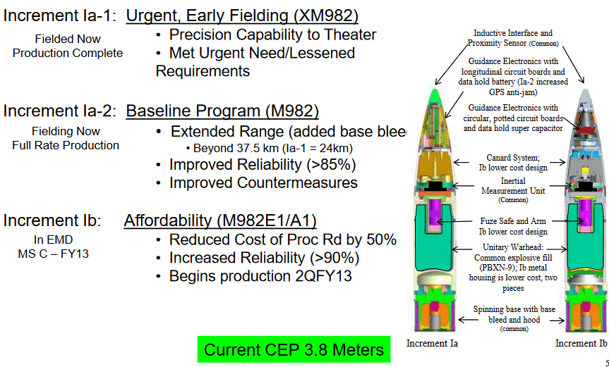 Description des obus Excalibur depuis les modéles de présérie jusqu'au modèle standart.